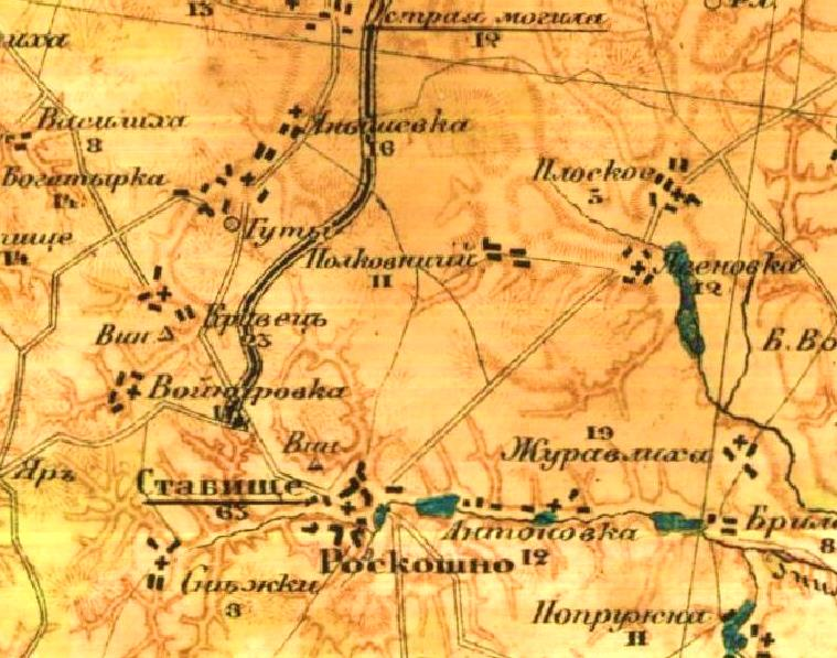 Карта села Полковниче 1917 р